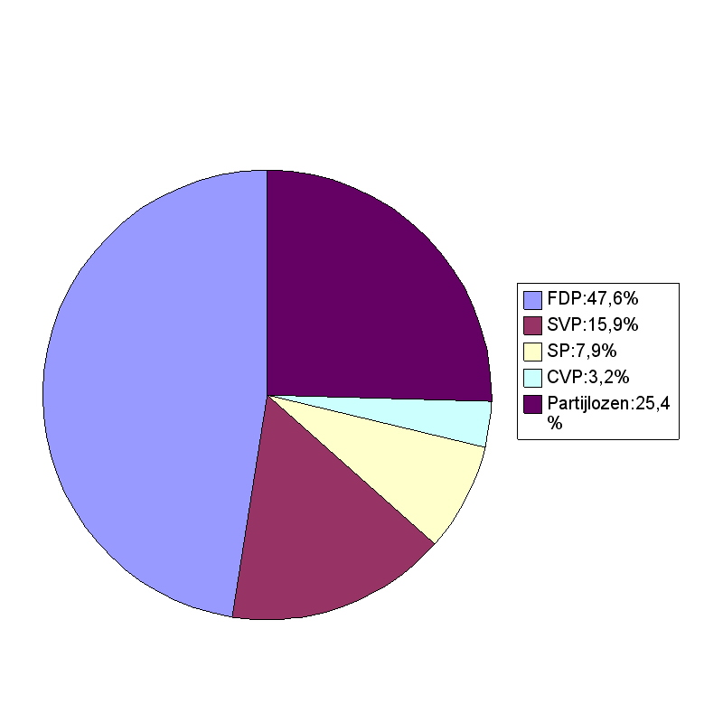 Verkiezingsuitslagen in het kanton Appenzell Ausserrhoden